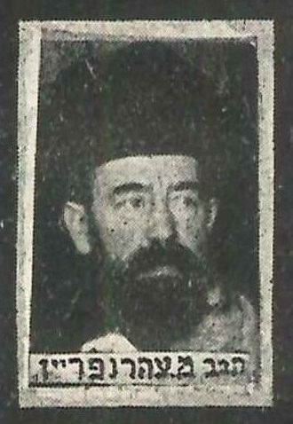 הרב מרדכי אהרנפרייז, בין משתתפי כתב העת "העולם", 1926